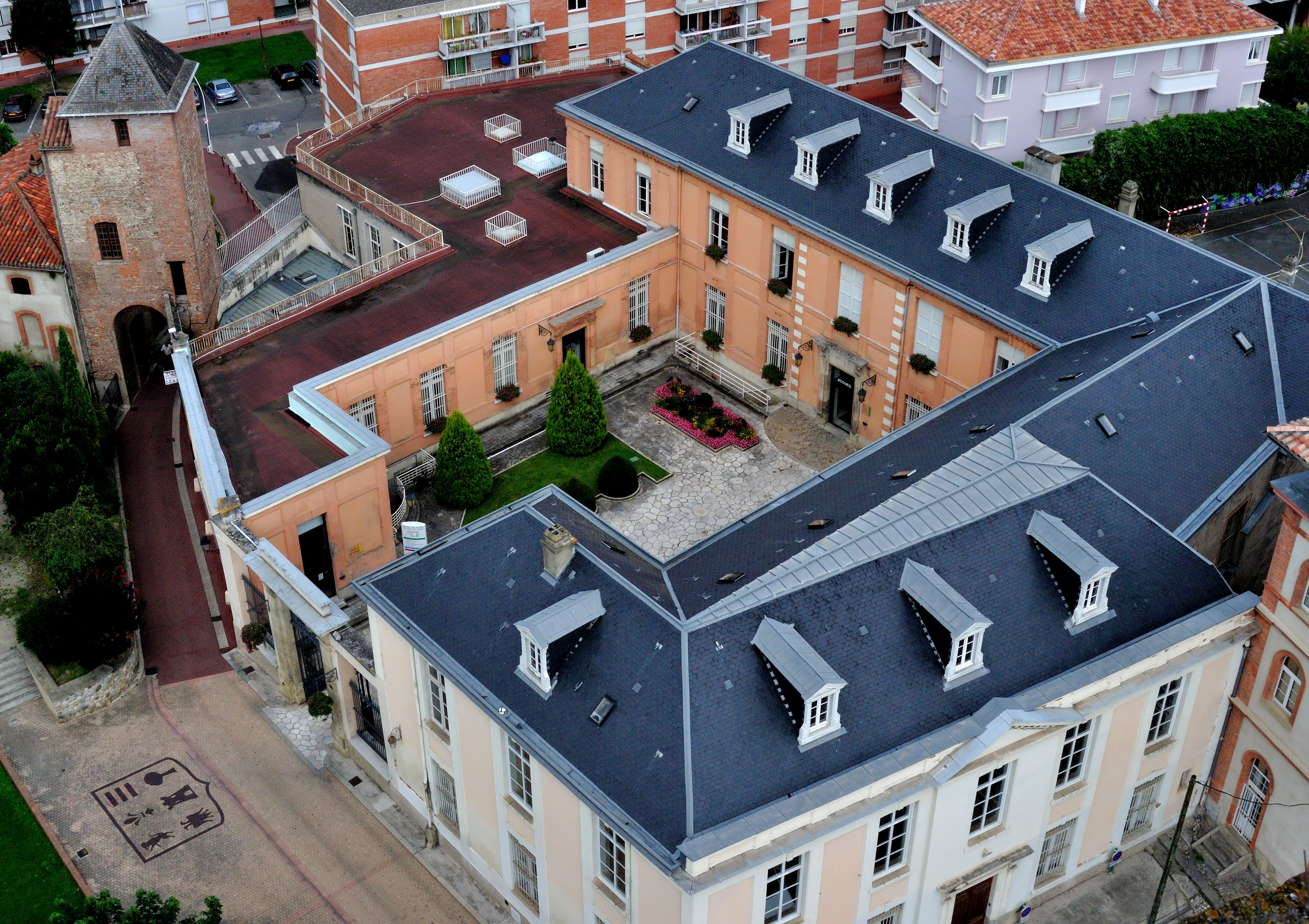 Pamiers (Ariège, Midi-Pyrénées, France) : Mairie (ancien évêché puis banque de France), porte de Nerviaux, et blason vus du clocher de la cathédrale.